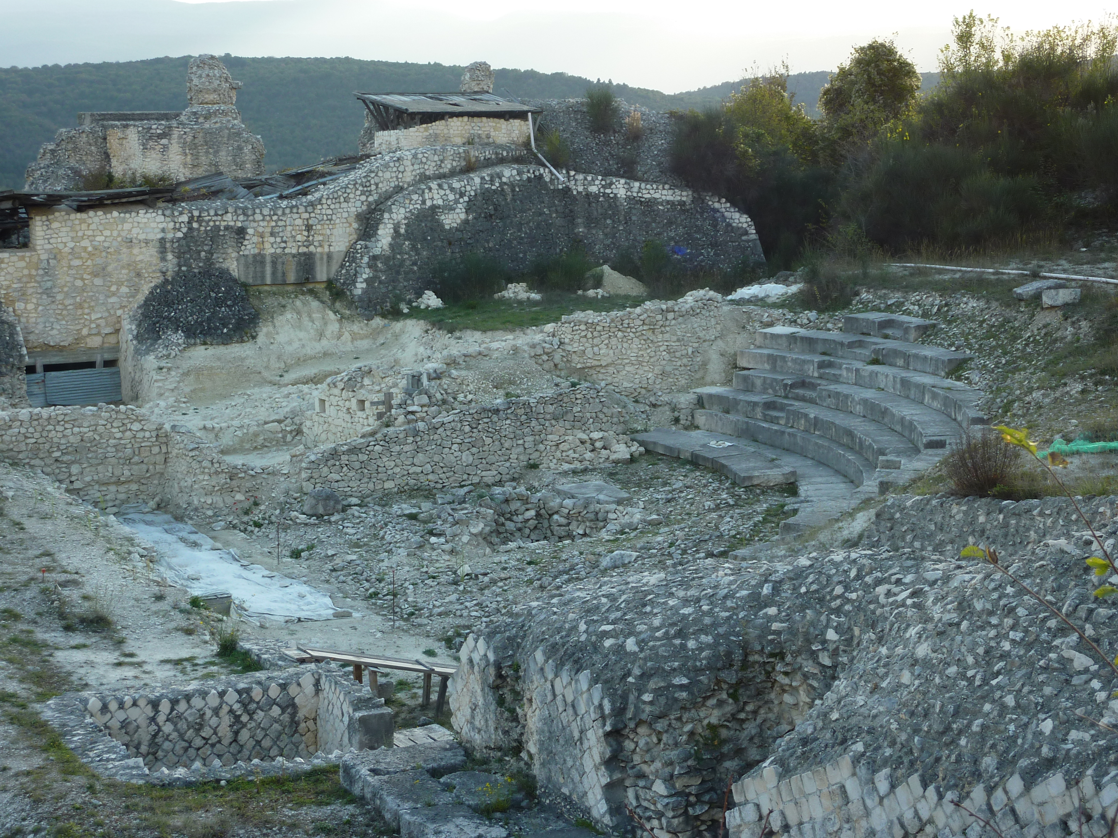 Peltuinum